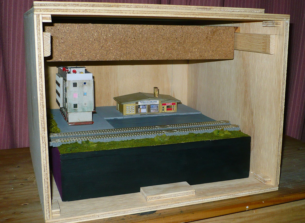 Un módulo T-TRAK sencillo, utilizado en maquetas ferroviarias modulares